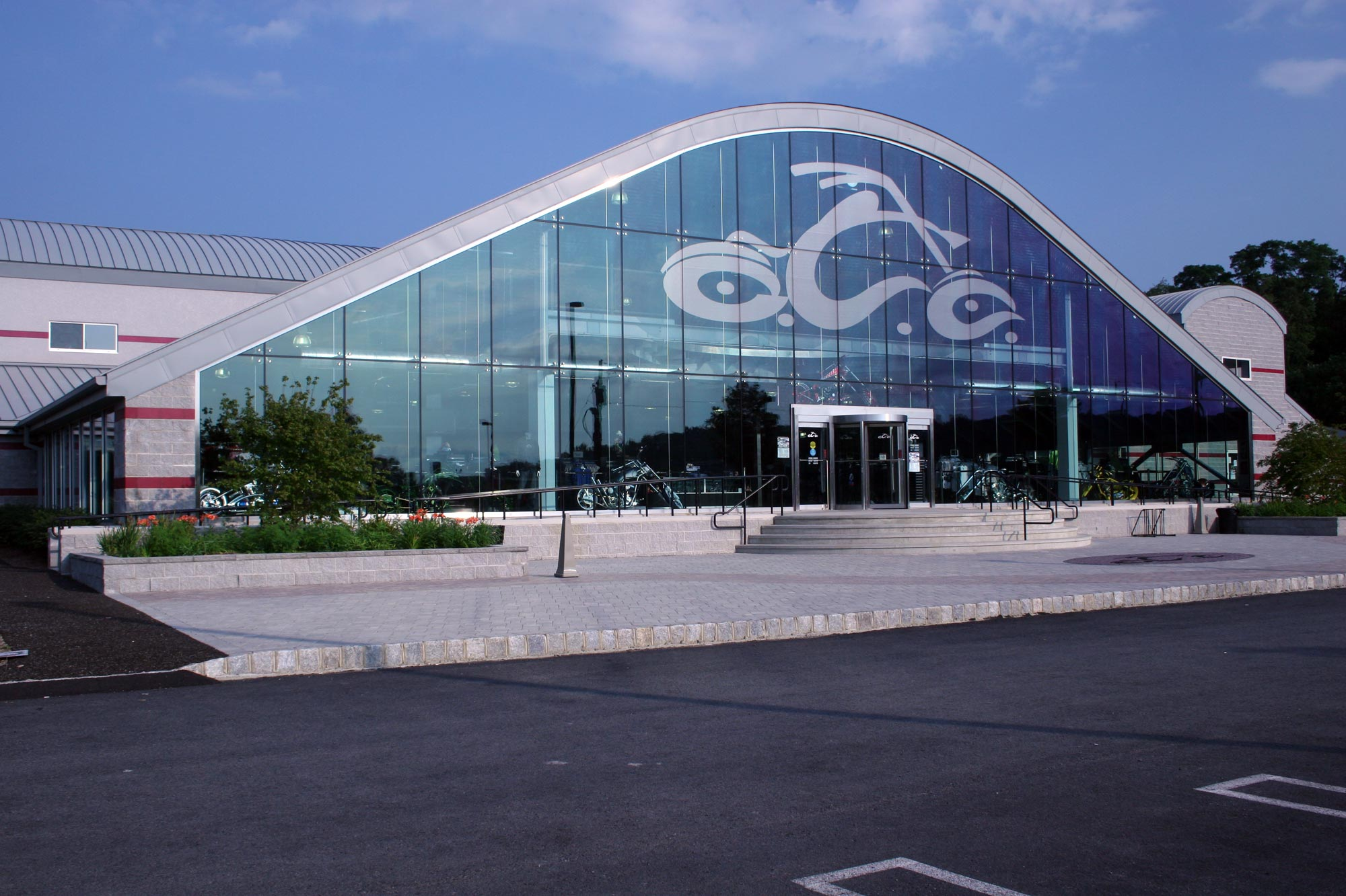 Siège social d'OCC